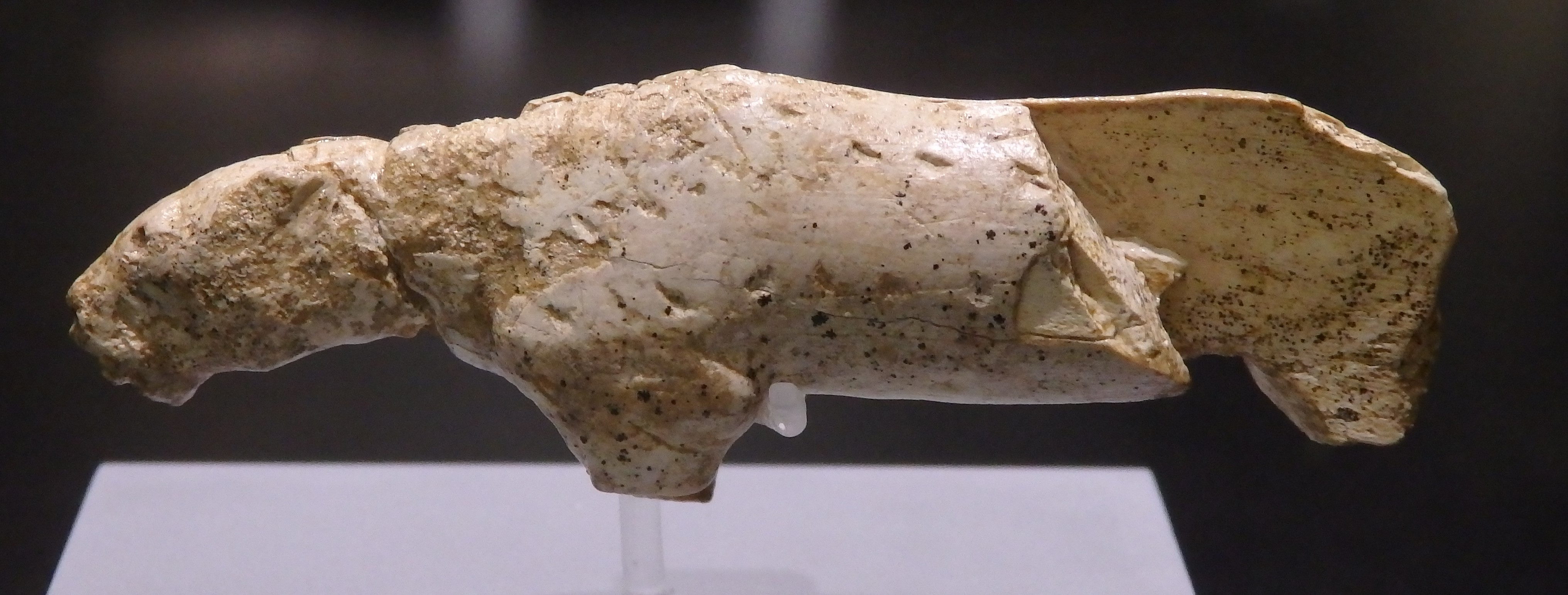 Löwe/Leopard aus Mammutelfenbein, 40-30000 Jahre vor heute, Vogelherdhöhle (BaWü), Uni Tübingen